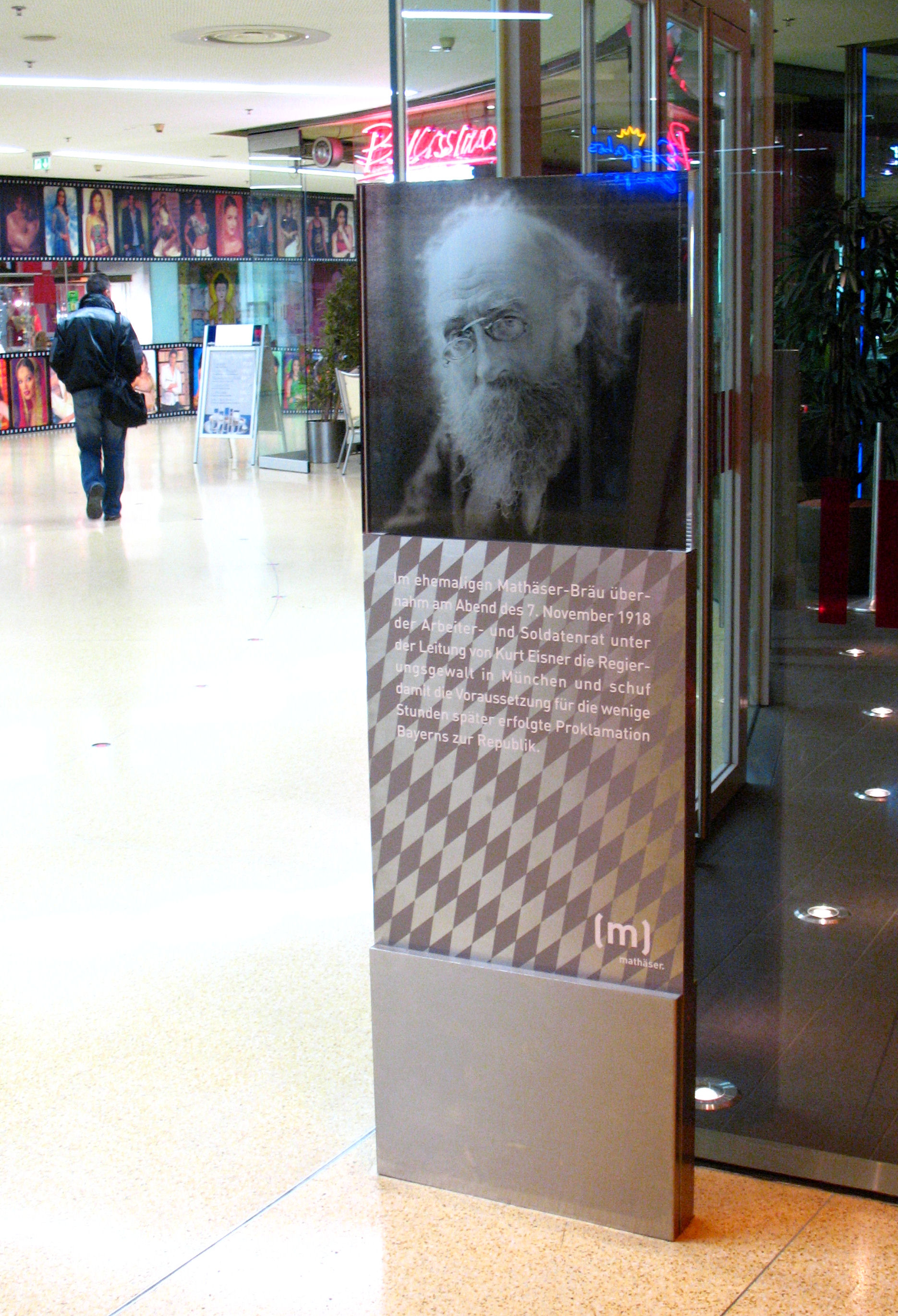 Germany, Bavaria, Munich, Kurt-Eisner-Stele in der heutigen Mathäser Einkaufspassage in München. An dem Ort an dem Kurt Eisner am 7. November 1918 den Freistaat Bayern ausrief